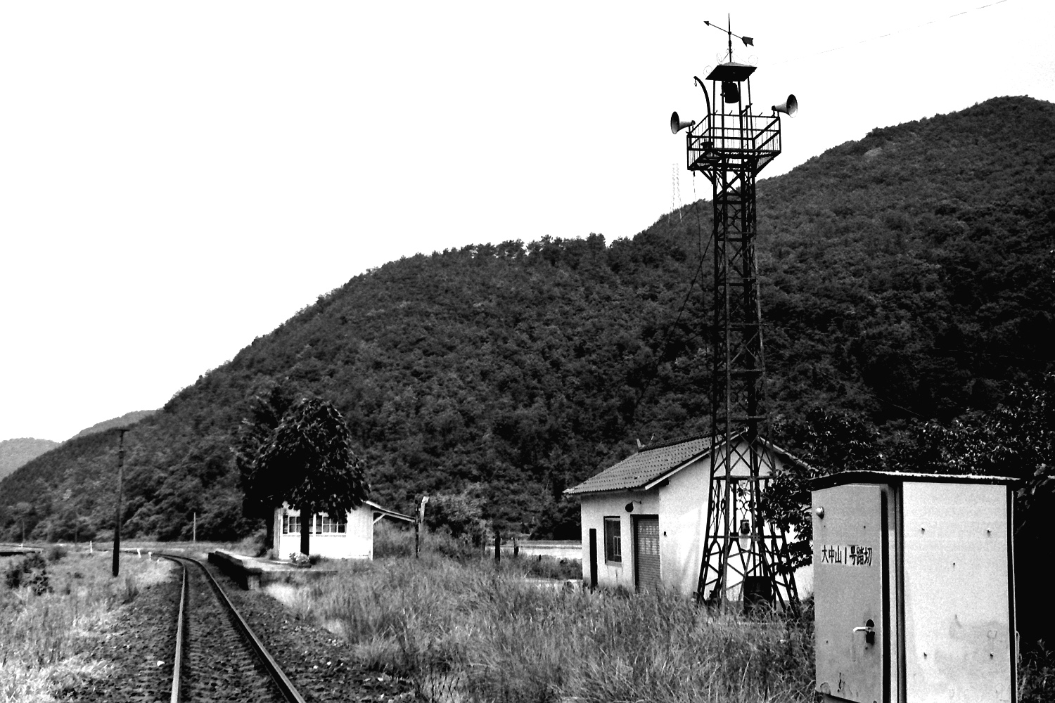 同和鉱業片上鉄道中山駅、1990年6月撮影